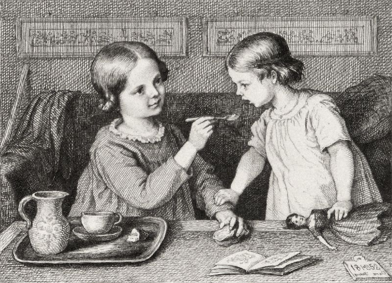 Brenn Dich nicht, das Süppchen ist zu heiß, Etching, 10,7 × 12,3 cm